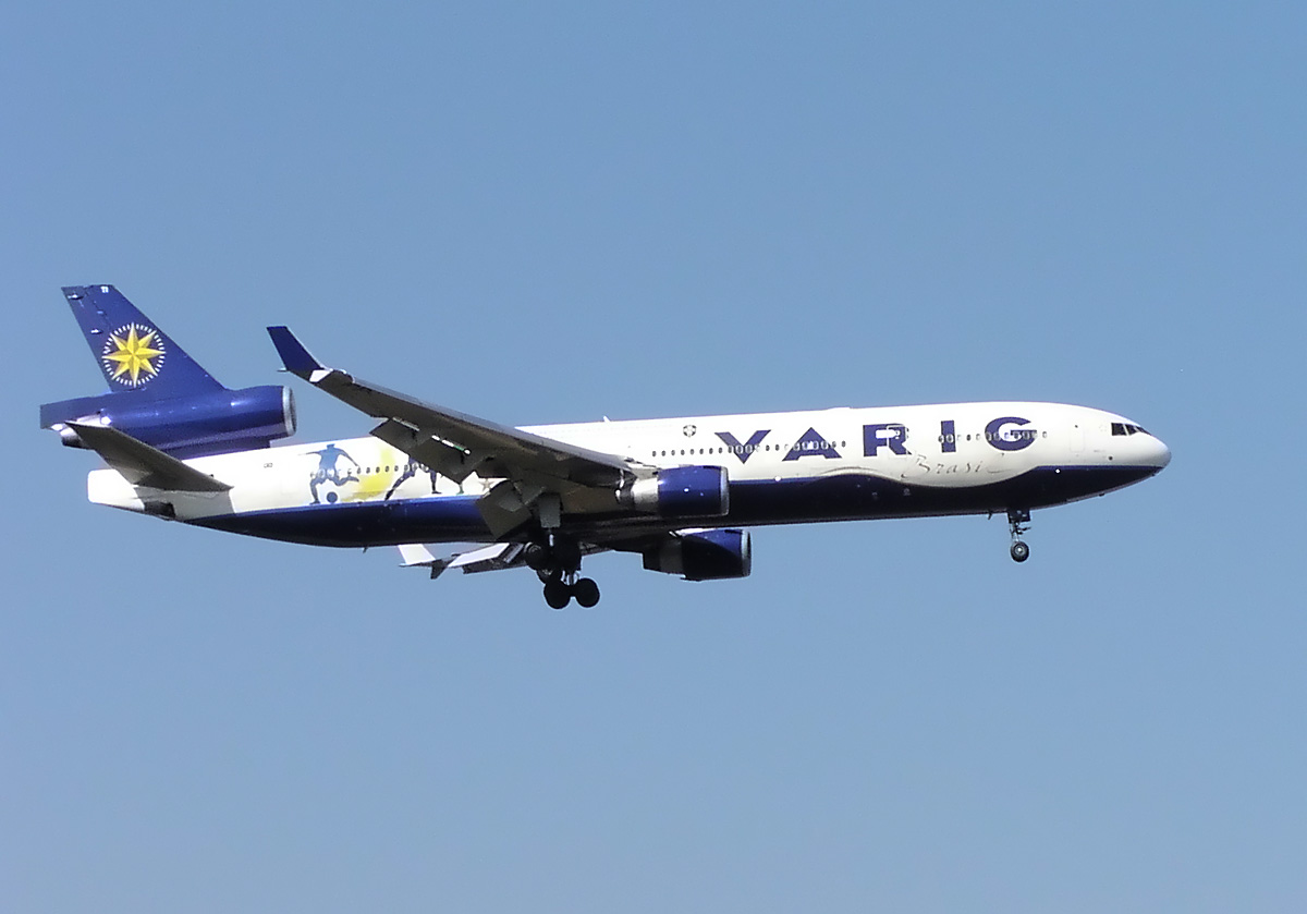 Varig MD-11 (PP-VTI) in Frankfurt (EDDF)